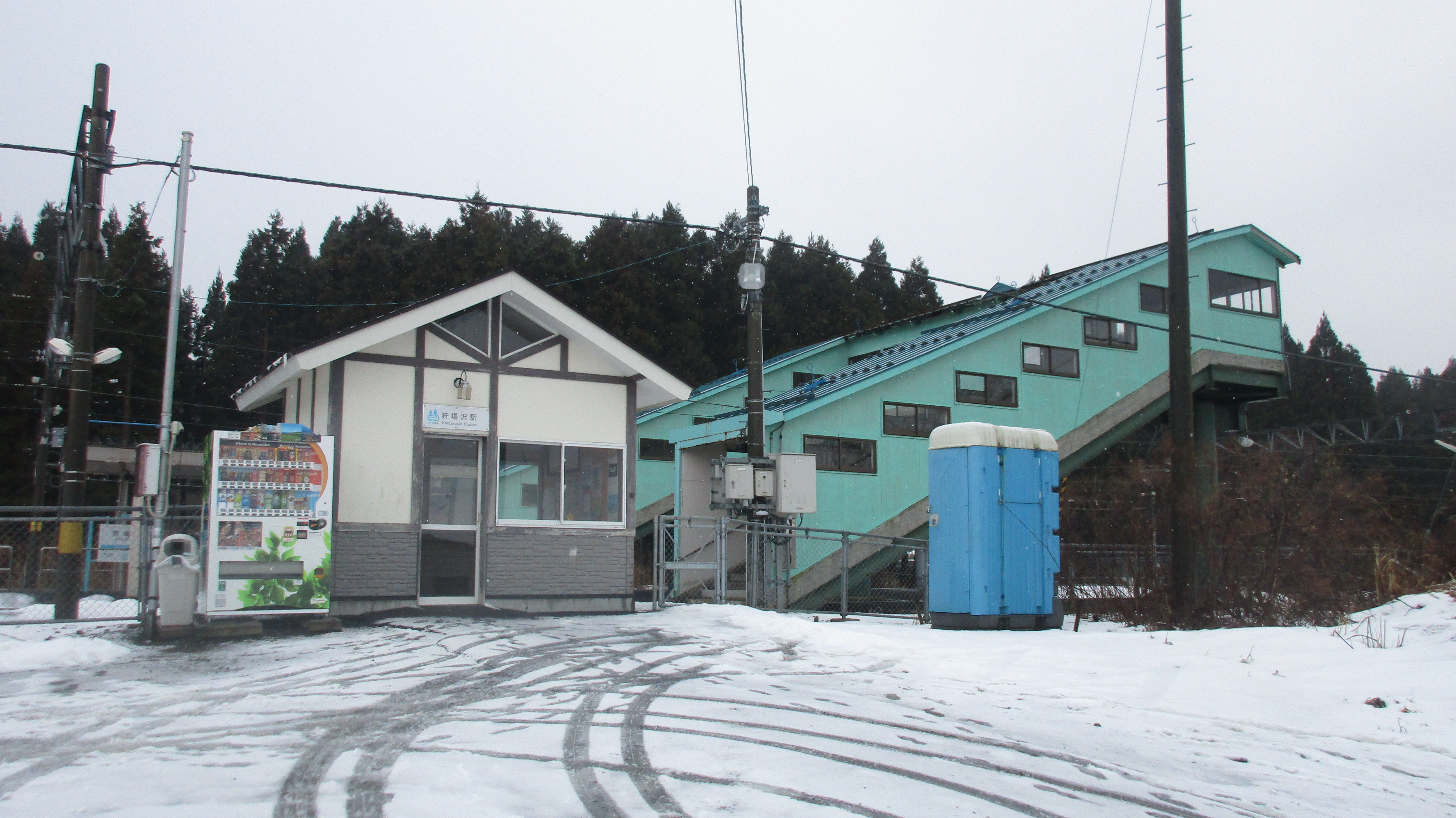 青い森鉄道狩場沢駅待合室